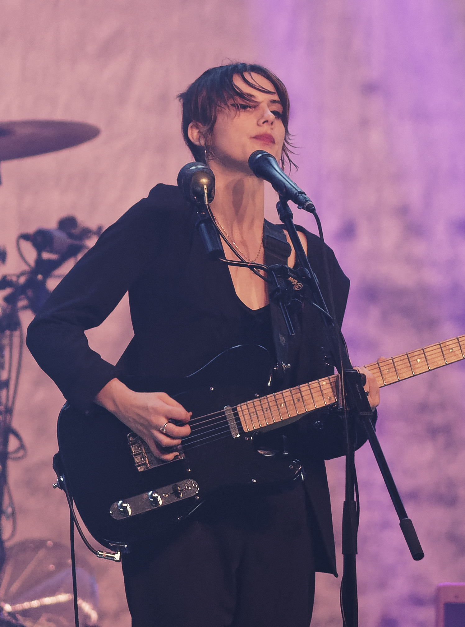 Wolf Alice Wolf Alice in De Melkweg in Amsterdam